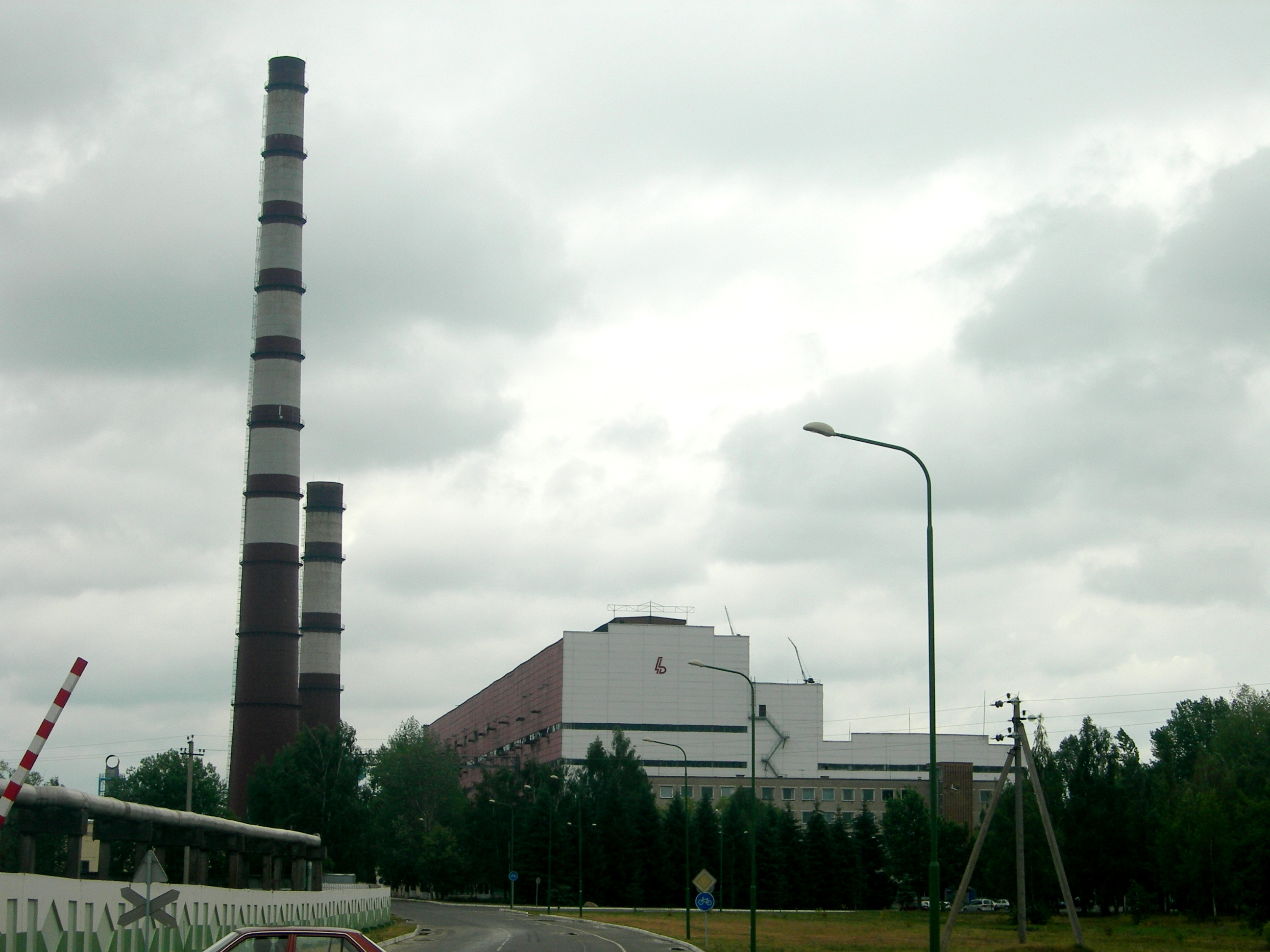 Biaroza power plant